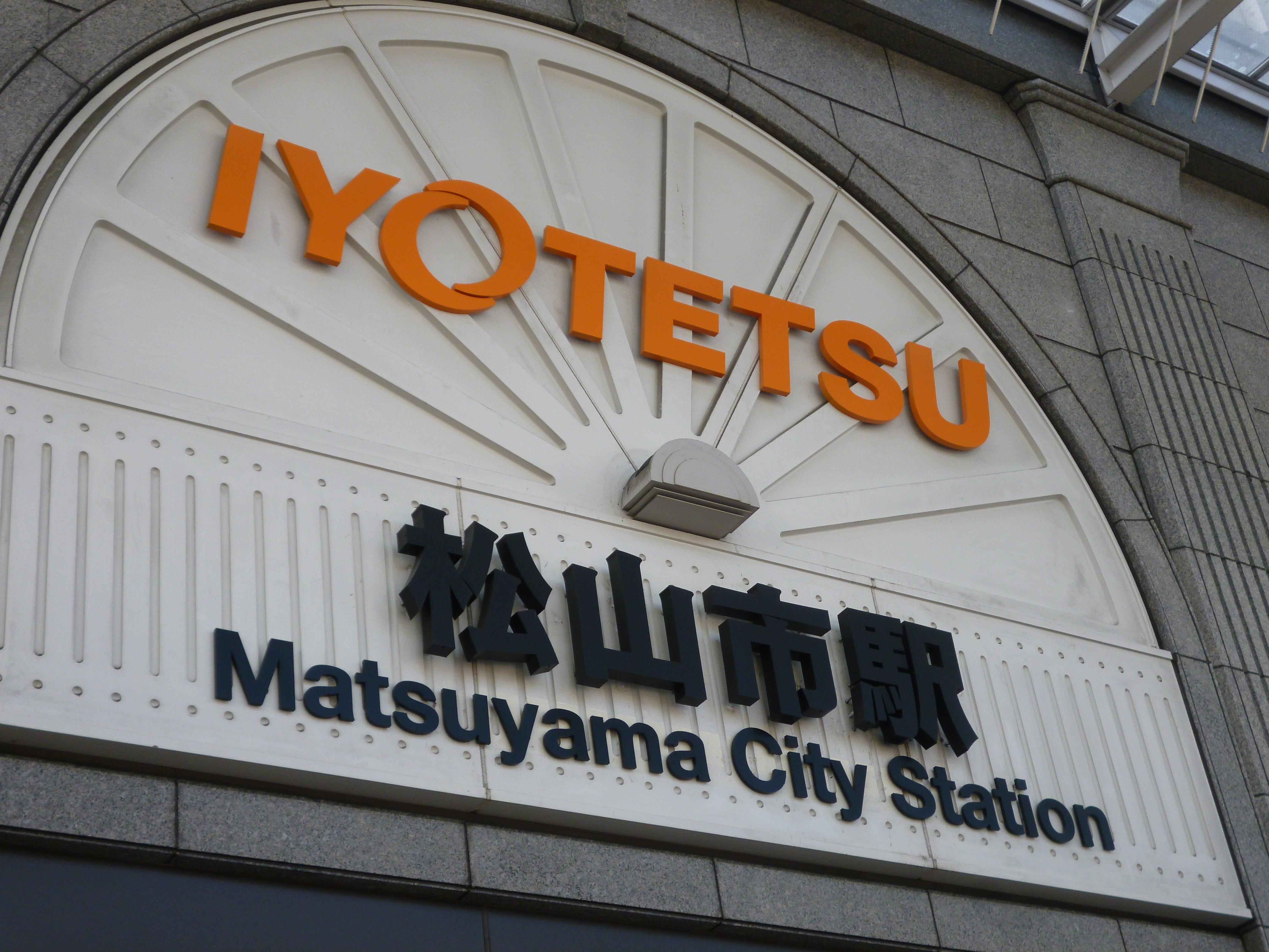 松山市駅駅名表記